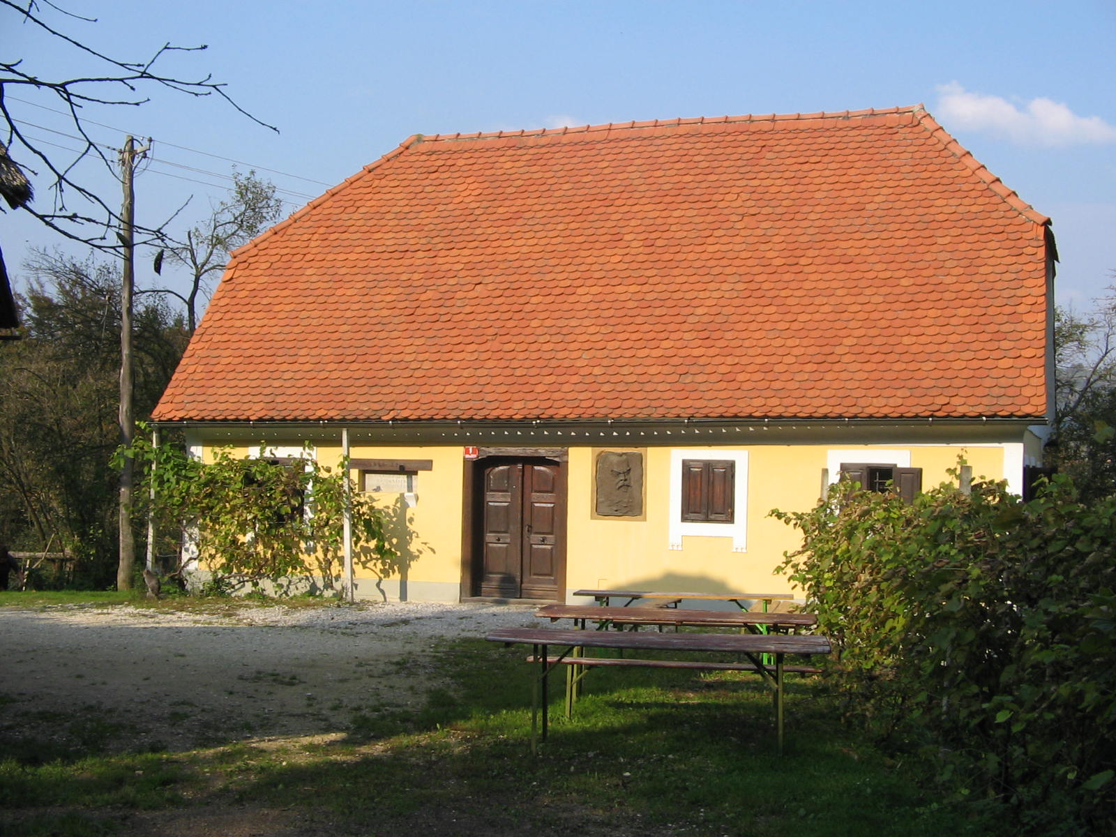 Geburtshaus von Anton Aškerc, slowenische Dichter Quelle: eigene Aufnahme 16. Oct. 2005 Fotograf: Janez Novak, Ljubljana, Slovenija